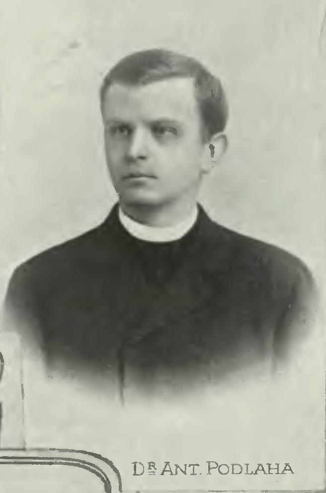 Portrét – Antonín Podlaha (1865-1932), Český římskokatolický kněz a teolog.